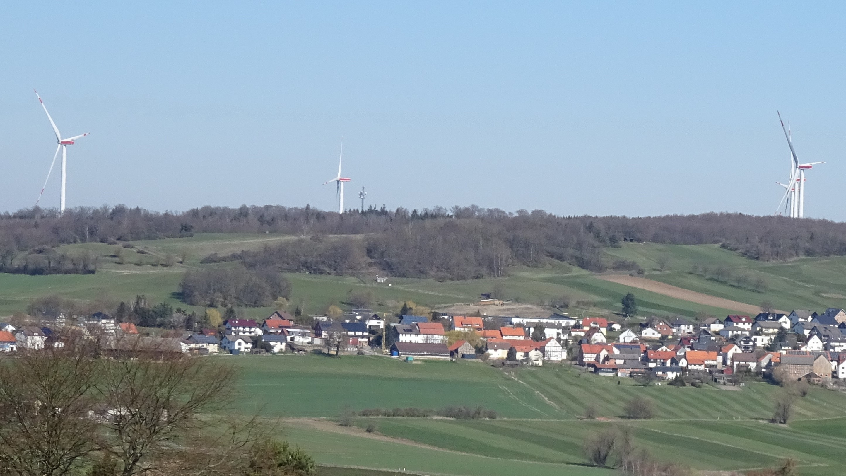 Ortsansicht von Süden